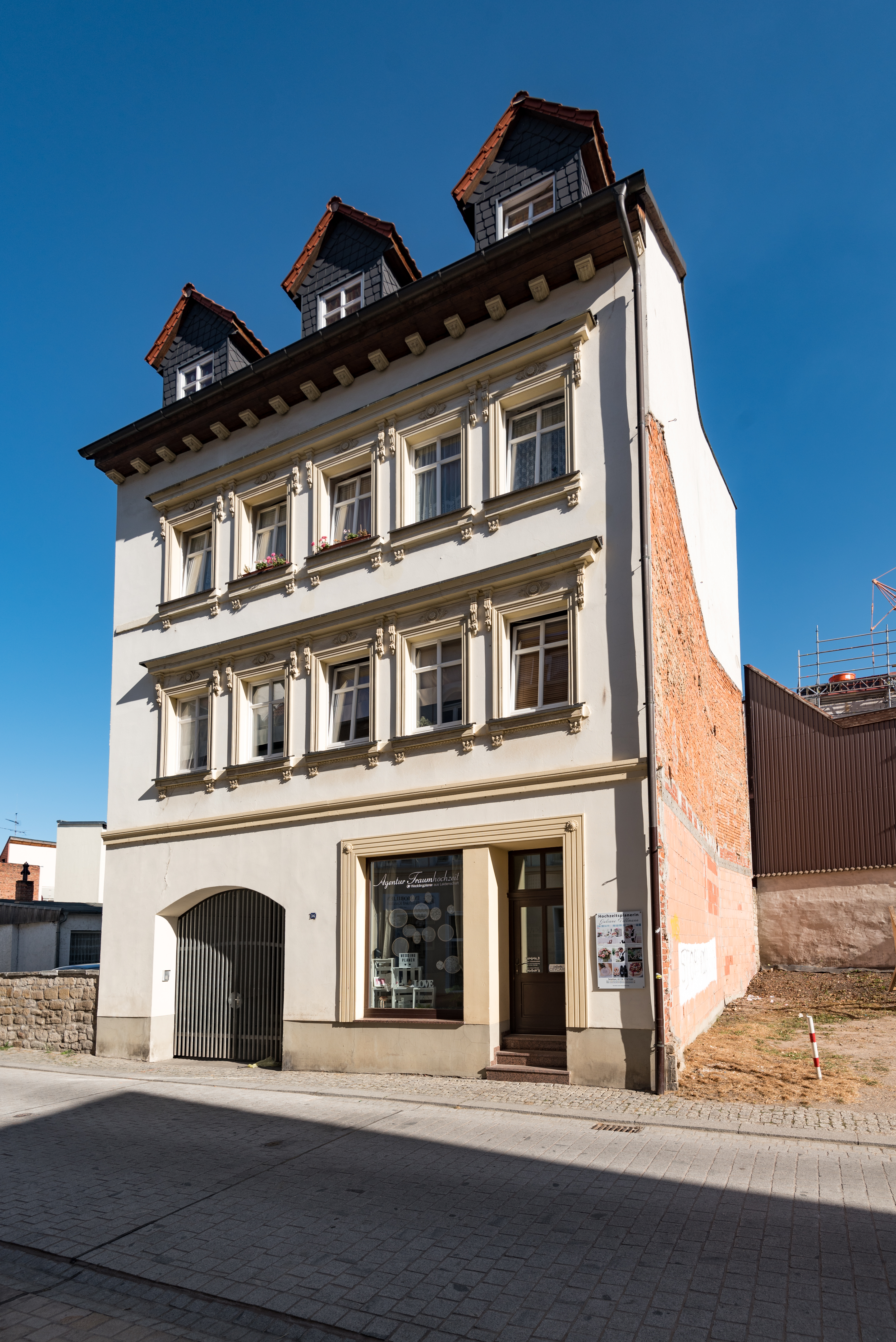 Weißenfels, Große Kalandstraße 36